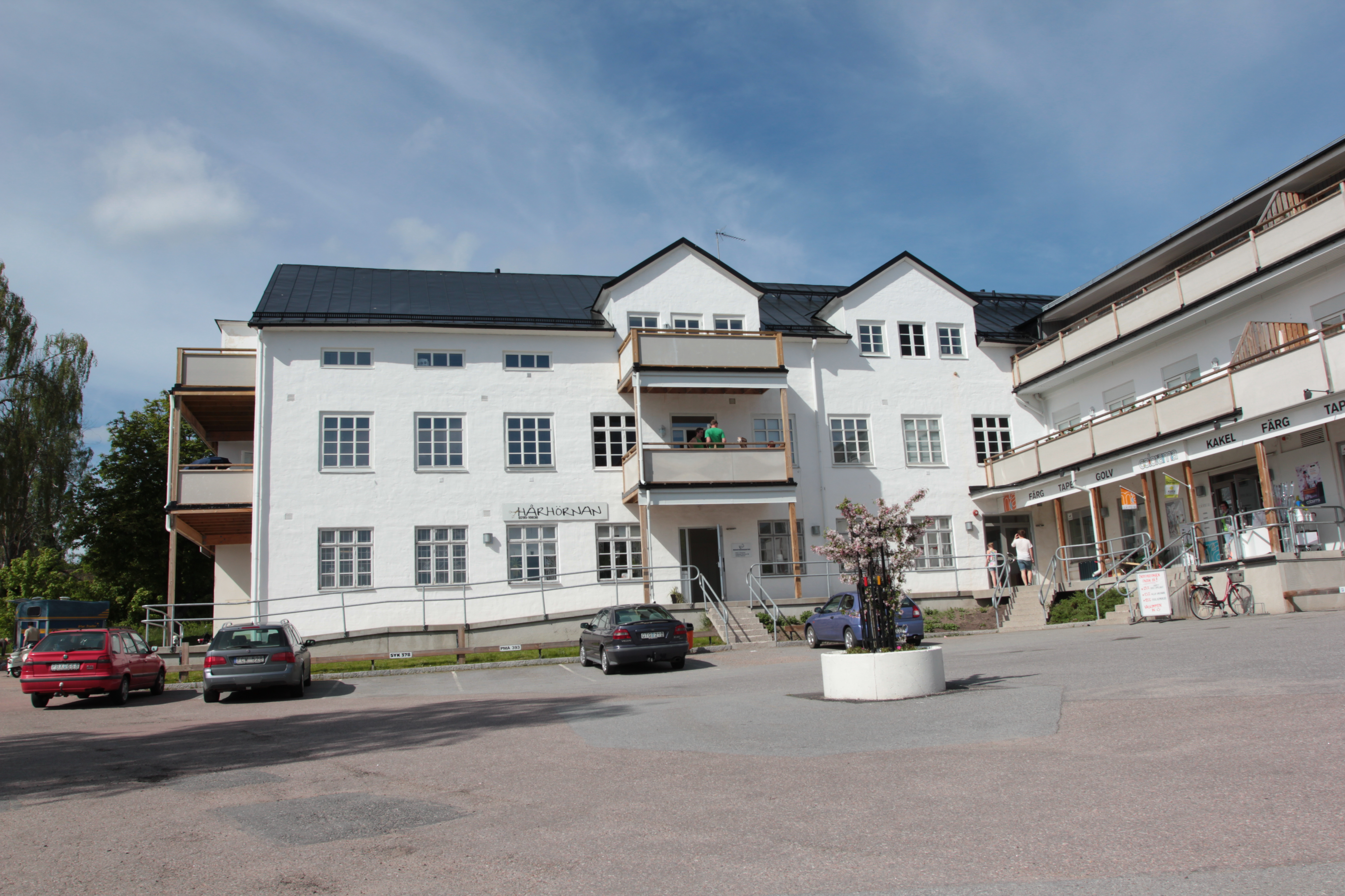 Gamla syfabriken SABÖ i Örbyhus. Det enda som återstår av den en gång blomstrande TEKO-industrin på orten, med flera aktörer. Foto uppladdat som en del i Bergslagssafarin 26 maj 2012.